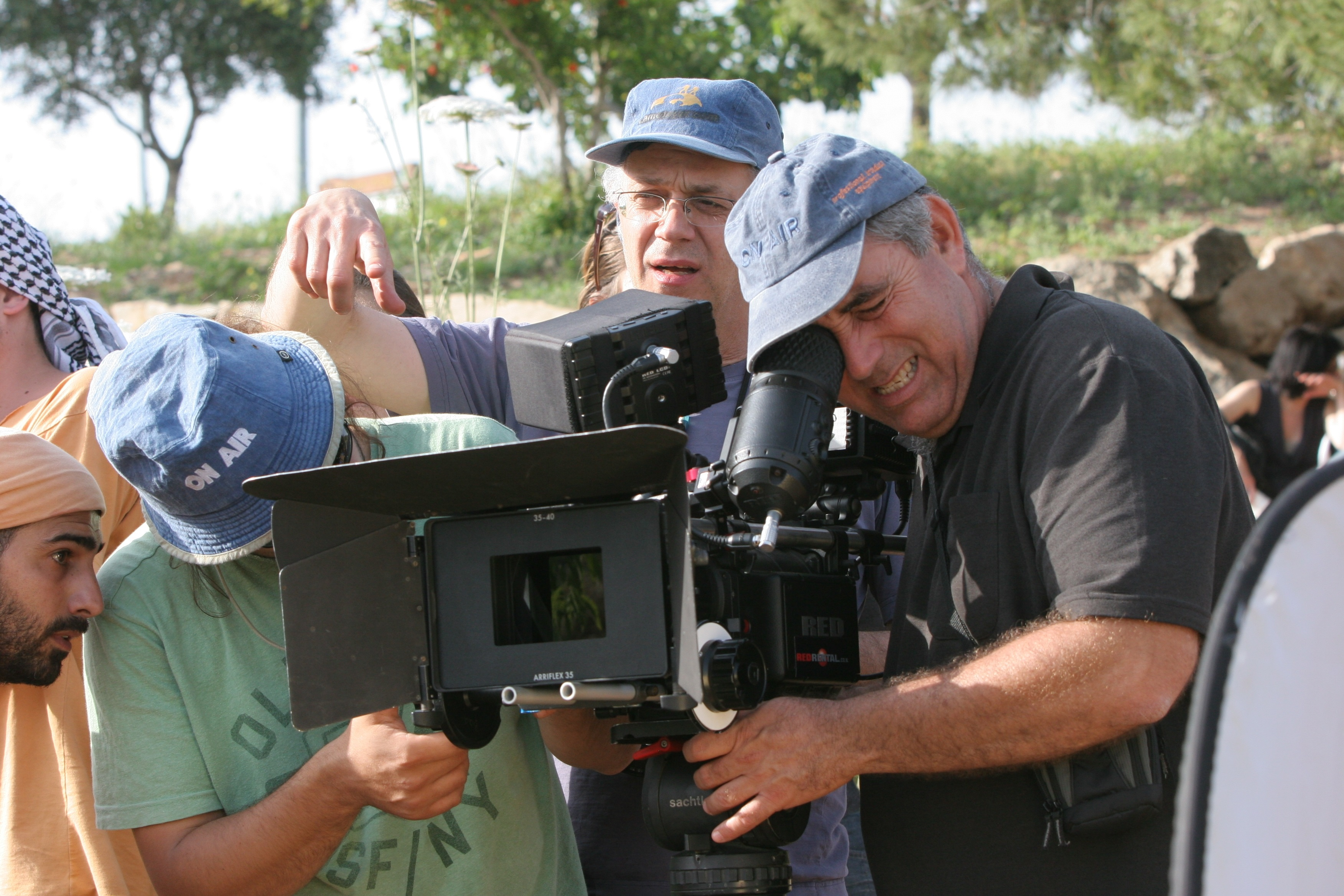 הבמאי ענר פרמינגר באתר הצילומים של הסרט החיים בינתיים